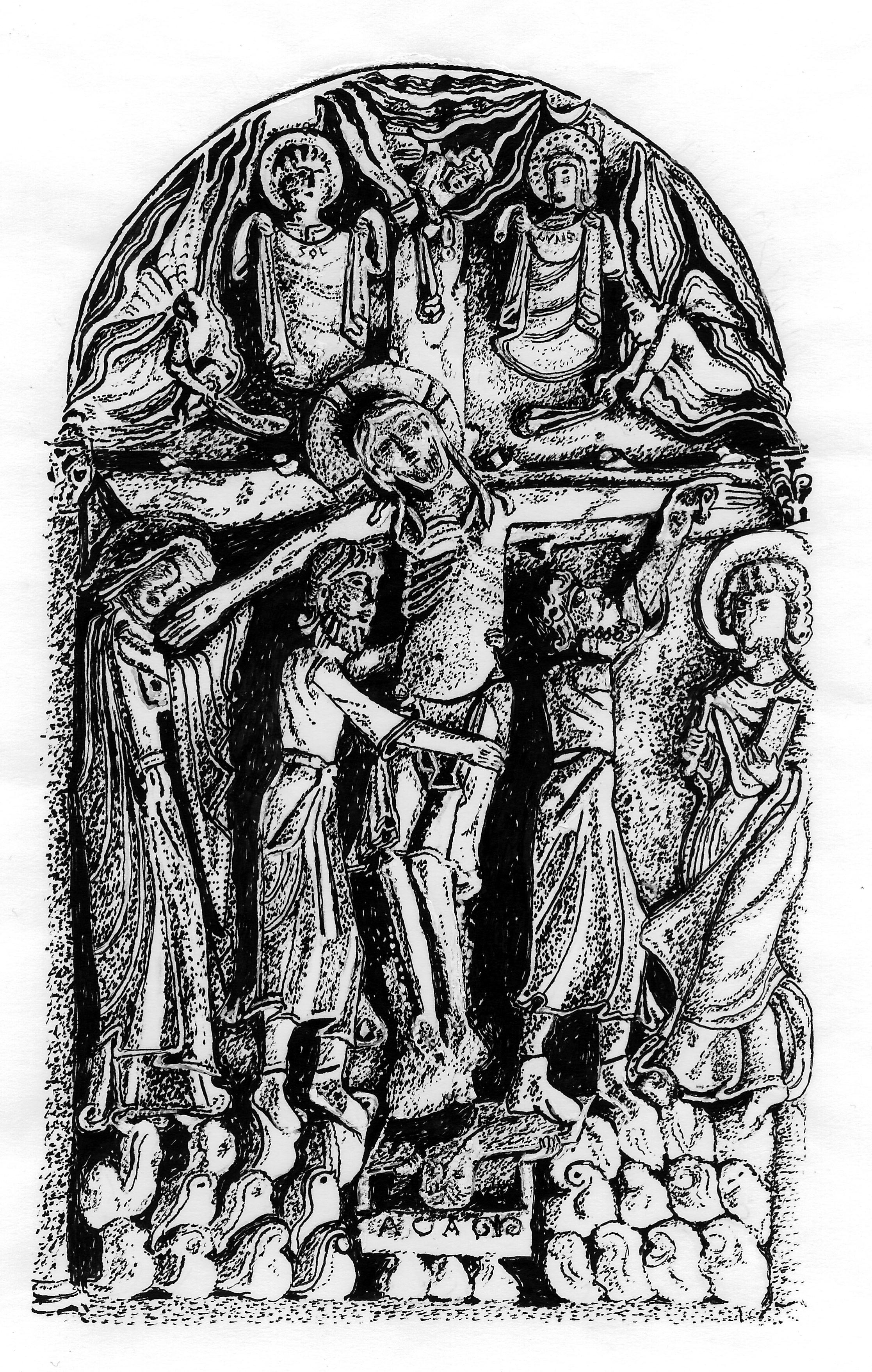 Nachzeichnung des Steinreliefs der Kreuzabnahme im Kreuzgang des Klosters Santo Domingo de Silos (Prov. Burgos).